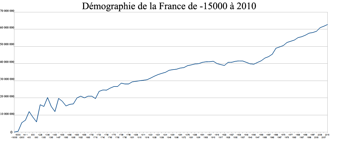 Population de la France (15,000 BC-2010).